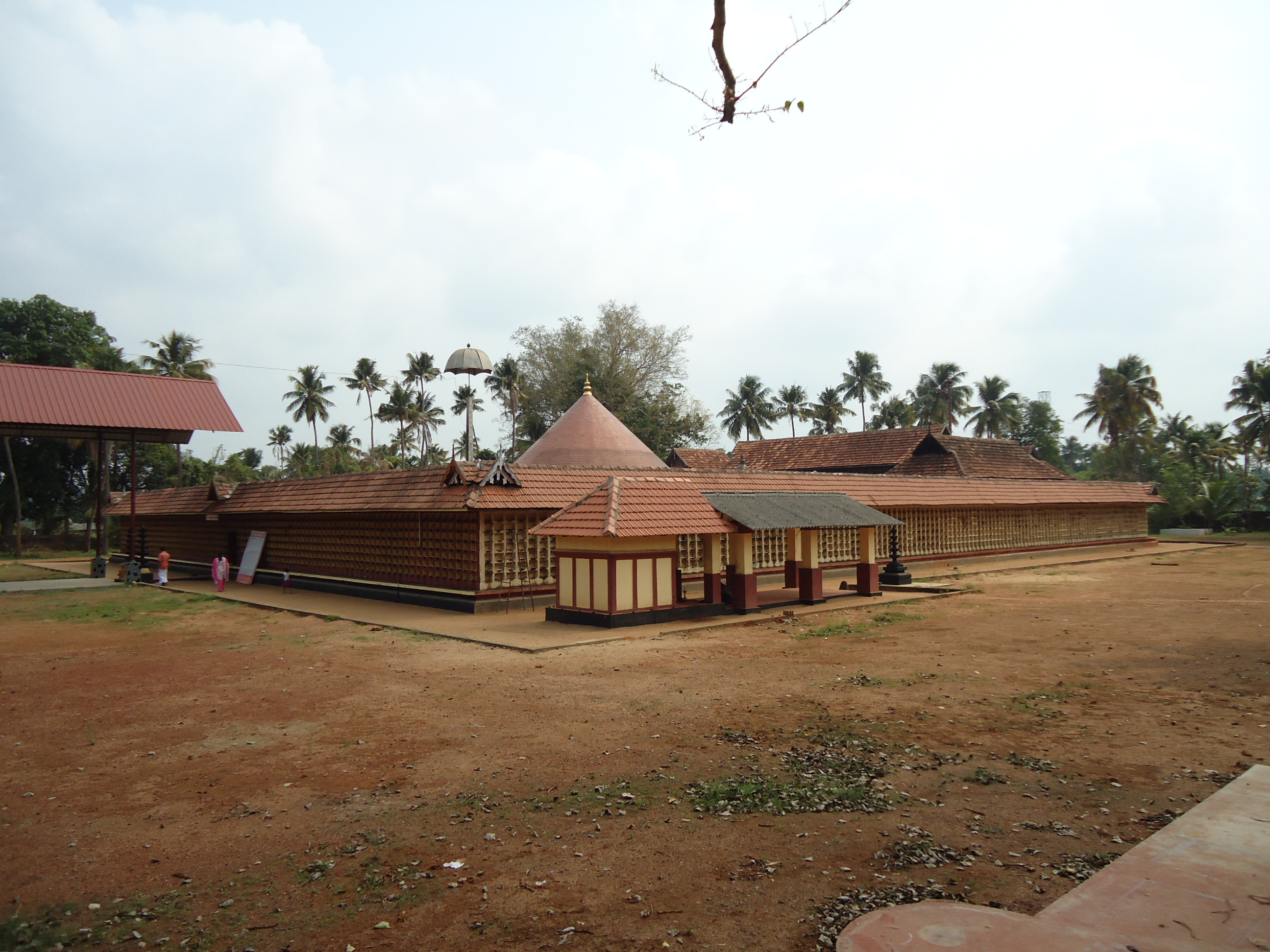 Sree Mahadeva Temple Chengamanadu Side View